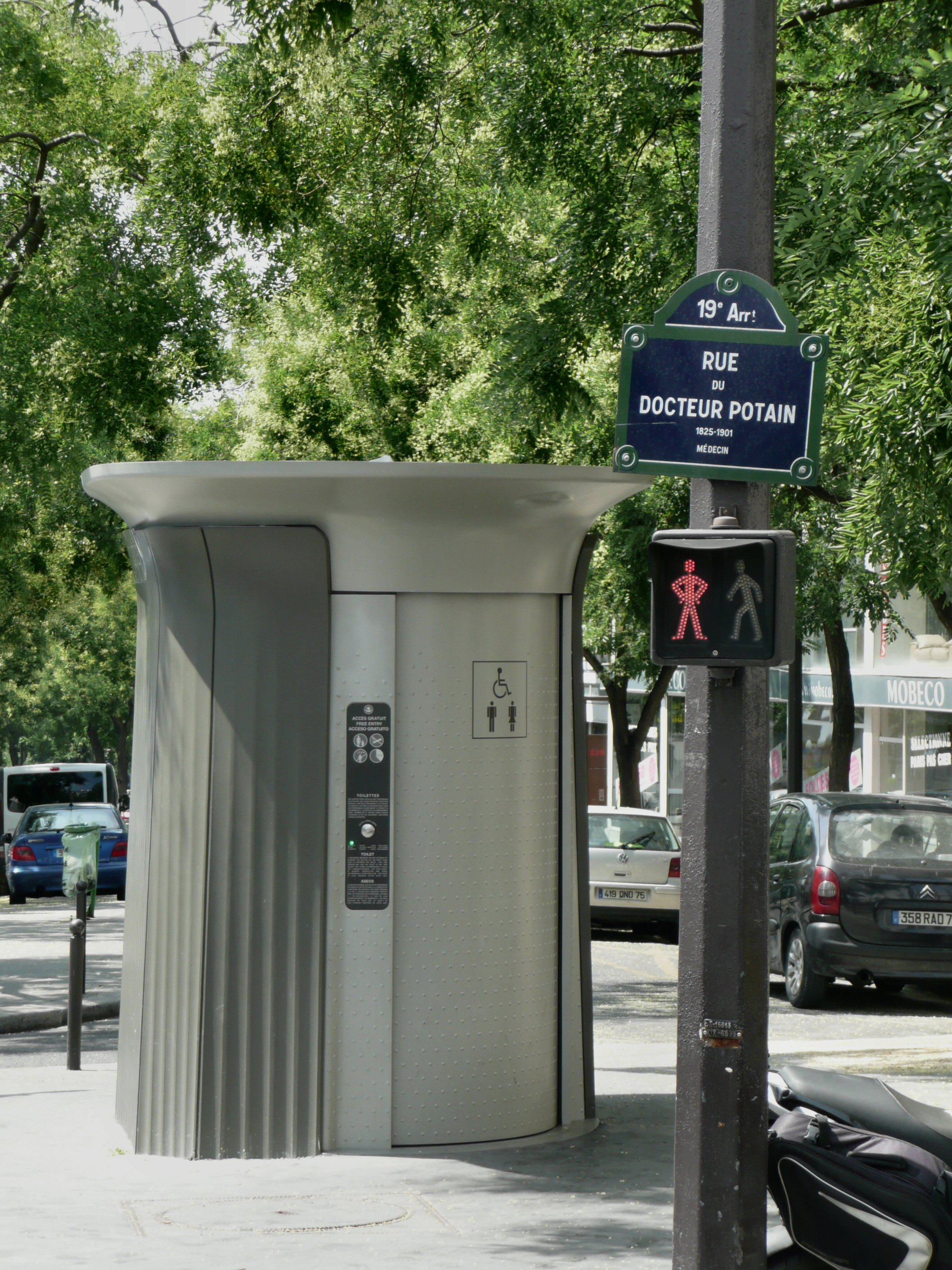 Plaque de la rue du Docteur-Potain, dans le 19e arrondissement de Paris, en mémoire de Pierre Charles Édouard Potain, cardiologue français (1825-1901)